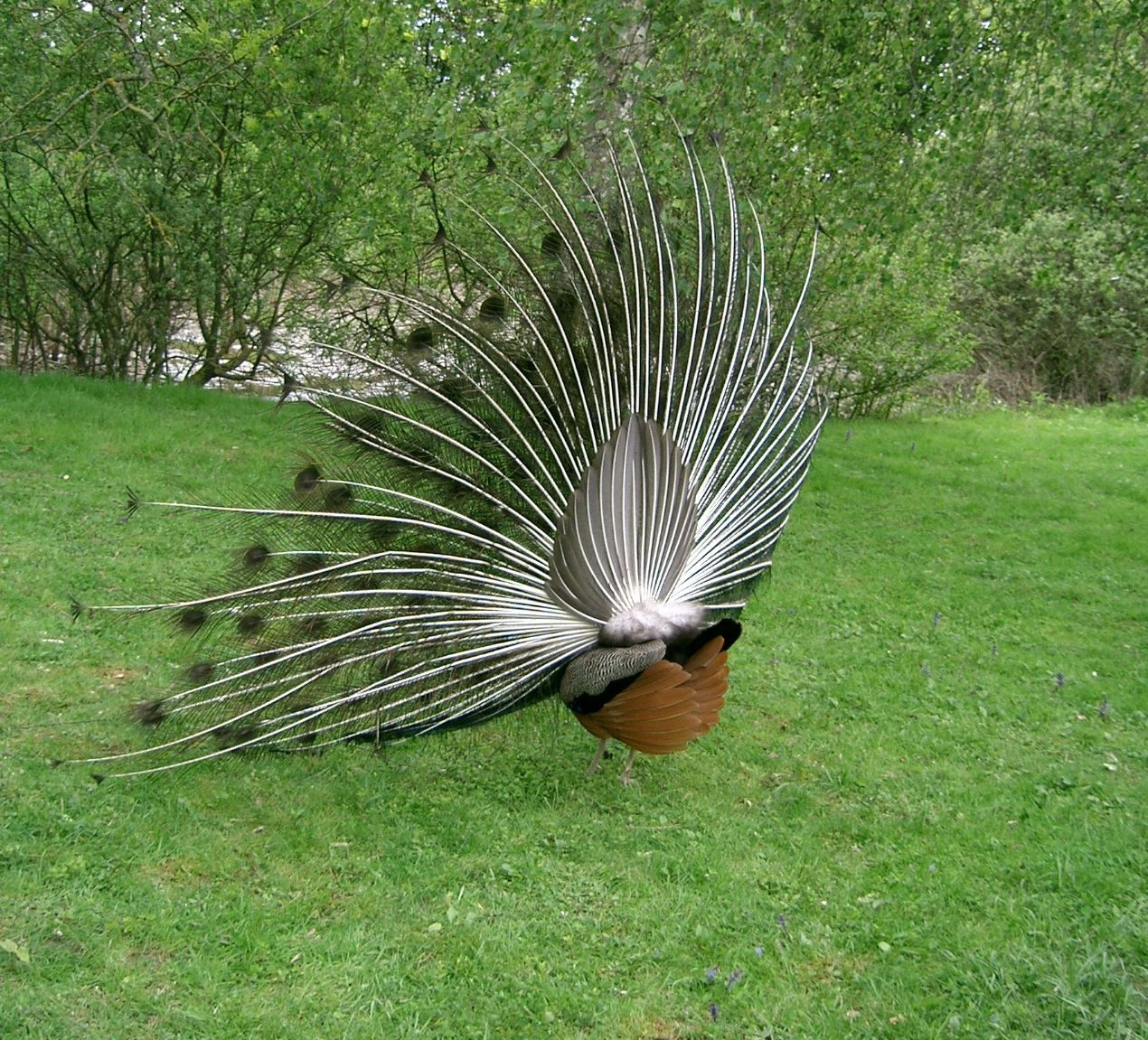 Paon de dos - peacock self made PRA